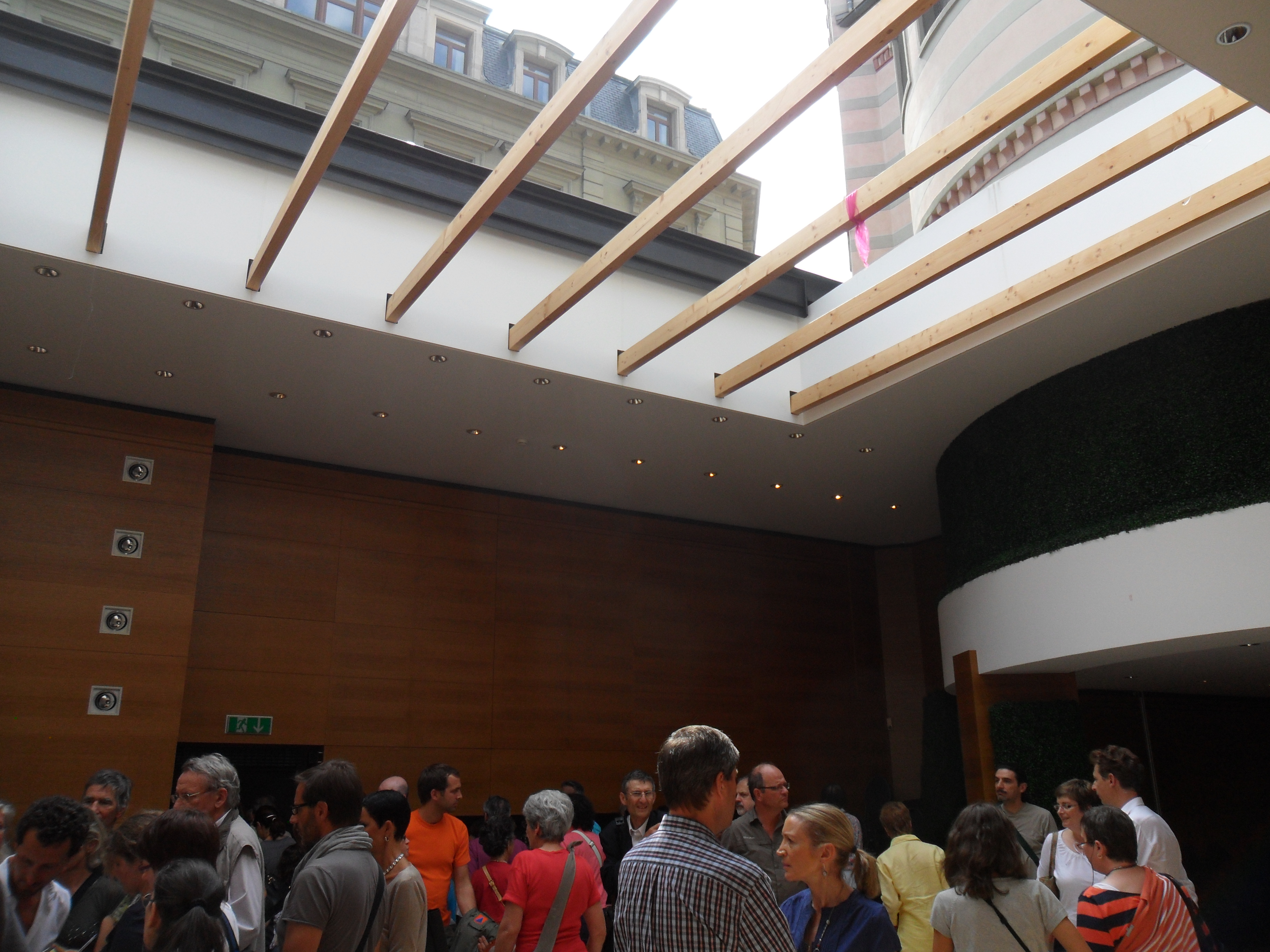 Salle polyvalente de la synagogue Beth Yaacov et son toit ouvrant pour la soukka